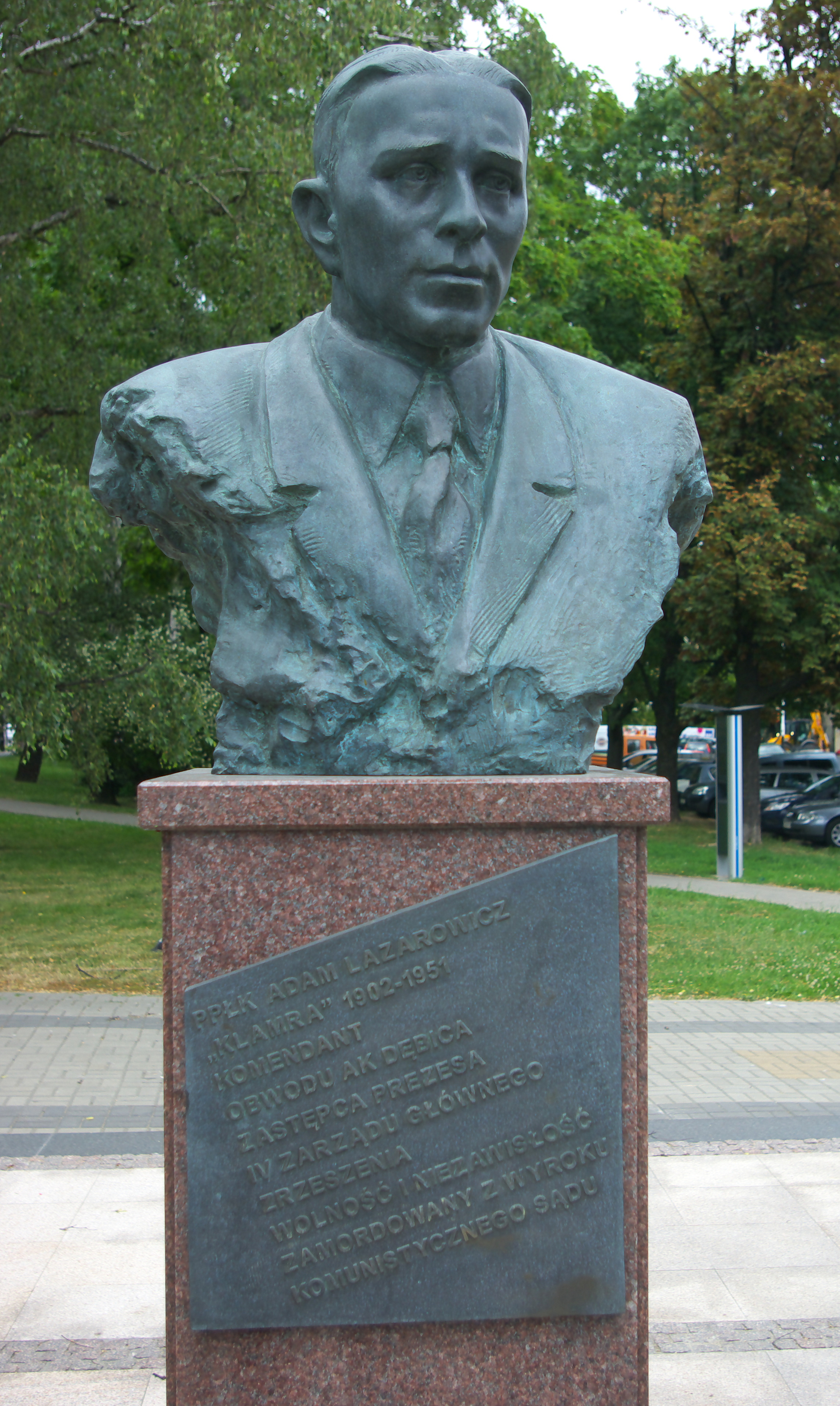 Pomnik Żołnierzy Wyklętych w Rzeszowie przy Alei Łukasza Cieplińskiego. Upamiętniony Adam Lazarowicz